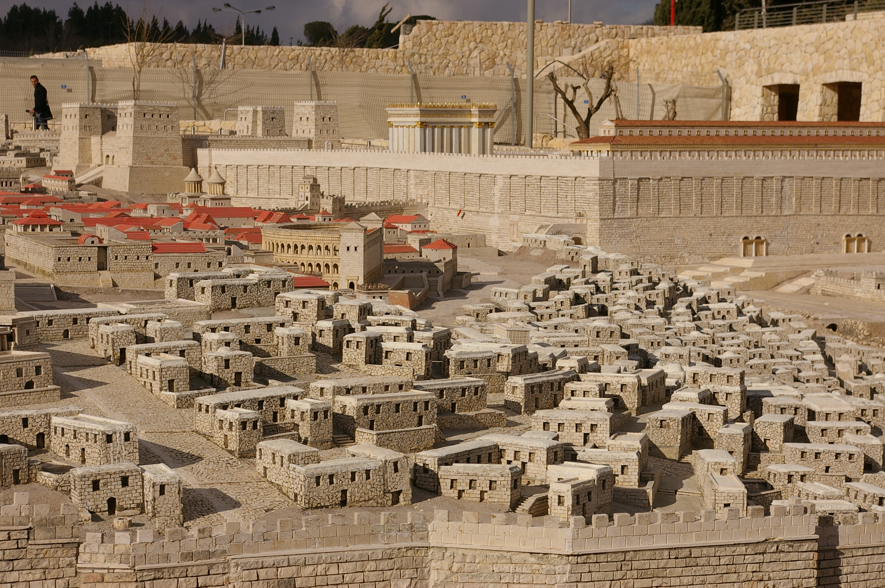 Maquette de Jérusalem au Ier siècle (1966) - Musée d'Israël Voir [1] et [2]